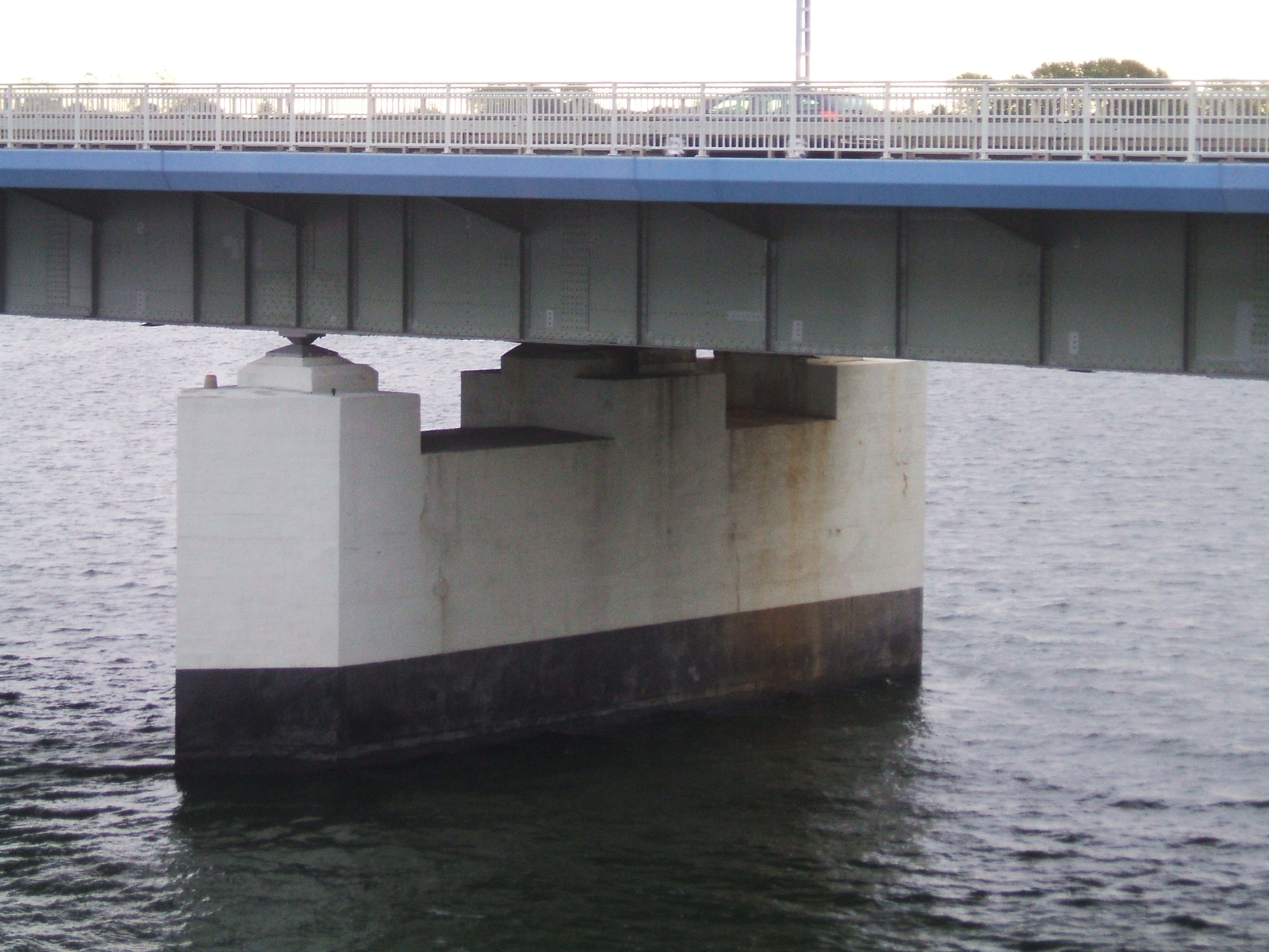 Rügendammbrücke